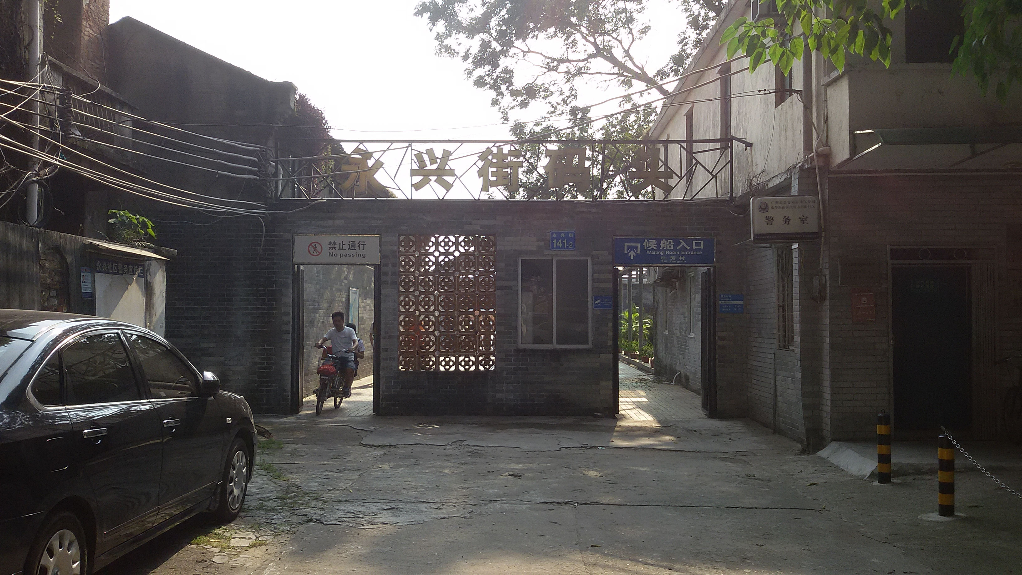 粵語: 永興街碼頭